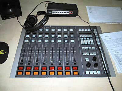 DHD RM3200D broadcast digital audio console.